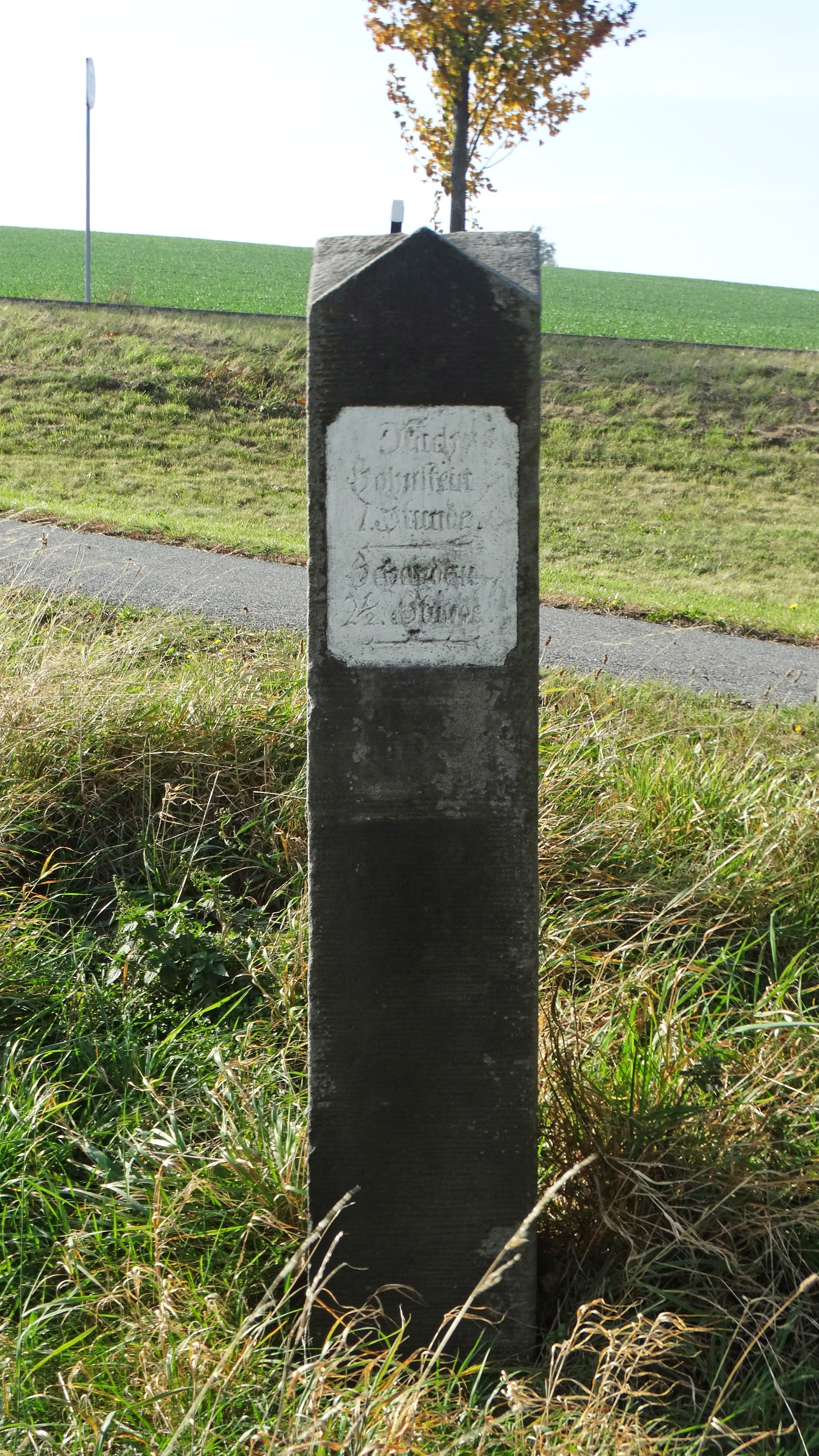 Kleindenkmal Wegweisersäule mit Richtungs- und Entfernungsangaben nach Hohnstein und Schandau in Hohburkersdorf (Hohnstein)